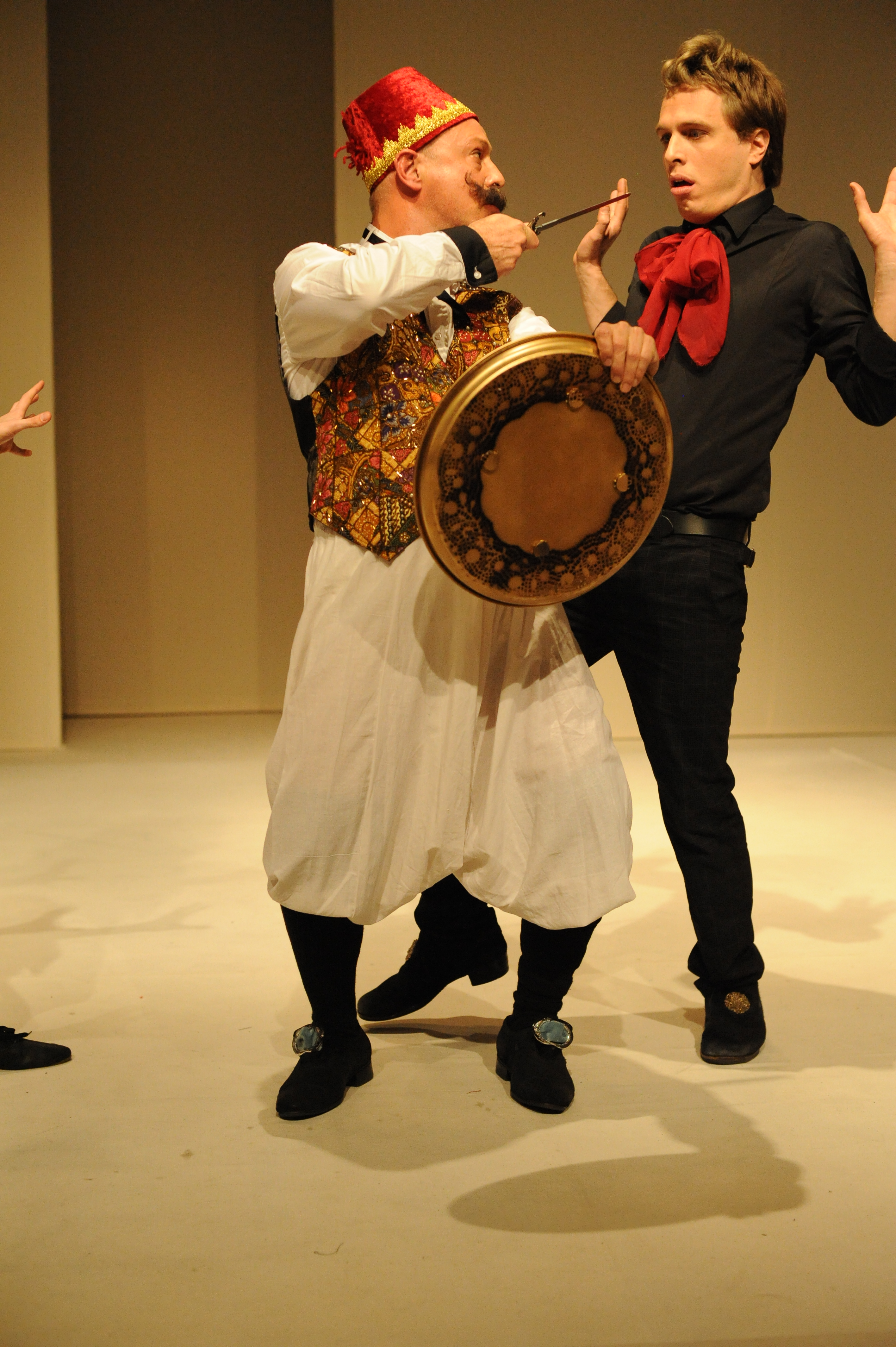 אודי רוטשילד וארז שפריר, בהצגה "תעלולי סקפן", בבימויו של אודי בן-משה, תיאטרון החאן, 2010